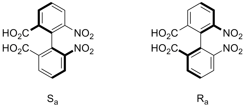 Die zwei Atropisomere von 6,6’-Dinitro-2,2’-diphensäure.